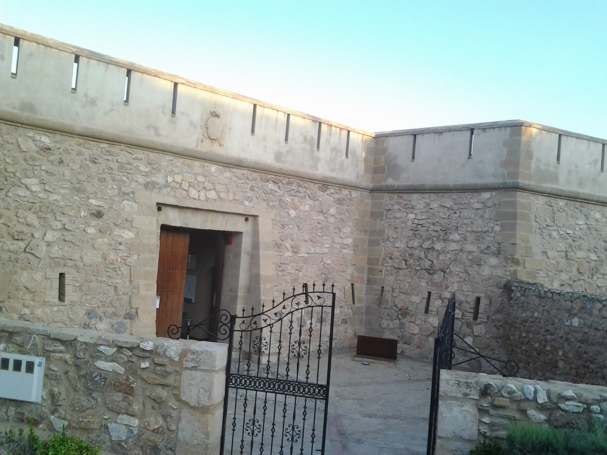 Castillo de Jesús Nazareno en Garrucha, Almería. Construido en 1769 por el arquitecto veratense Francisco Ruiz Garrido, actualmente alberga un centro de interpretación de la pesca.